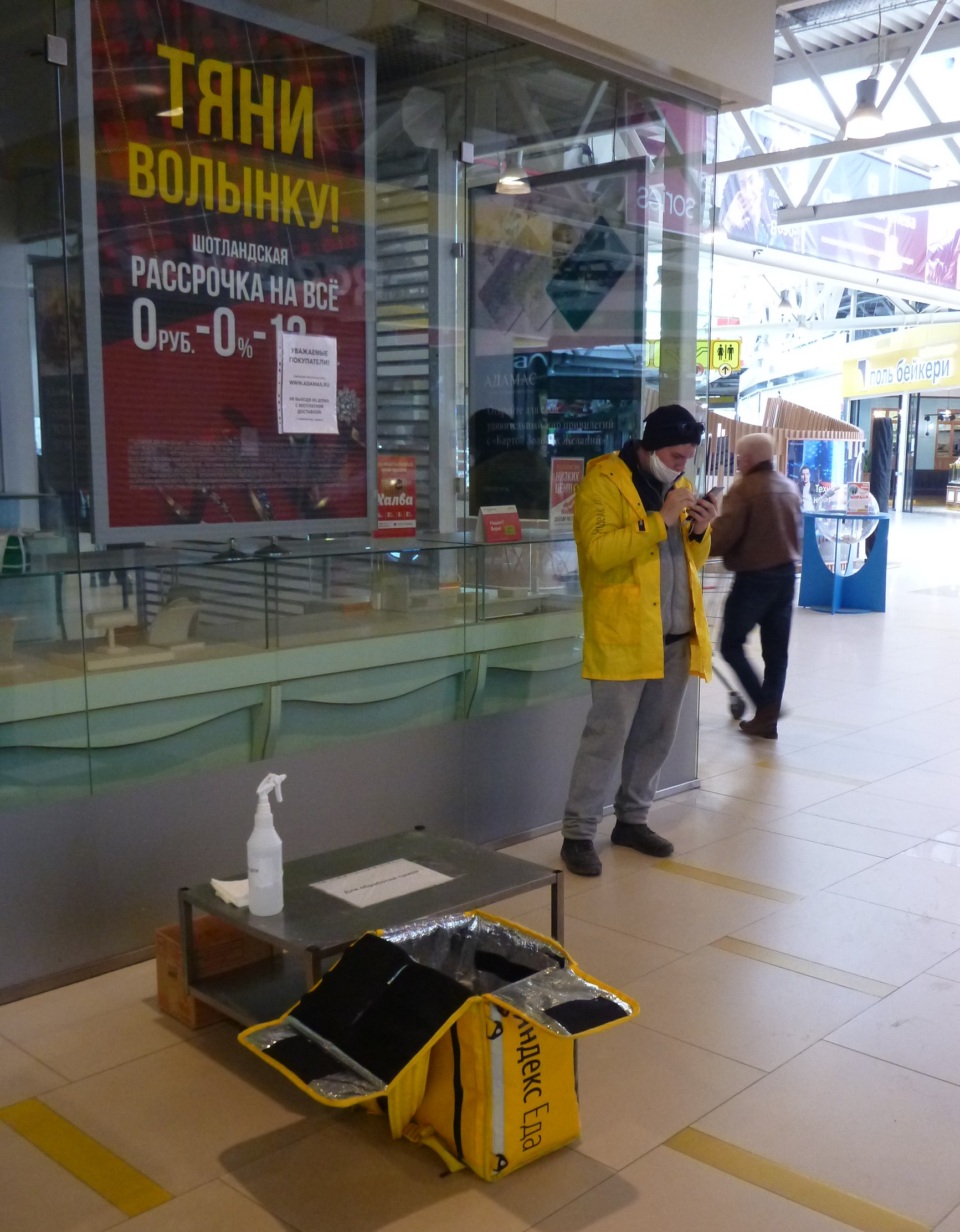 Курьер Яндекс Еды ждет заказа в Радуга-парке Екатеринбурга, рядом с курьером сумка и средства обработки ее. 27 апреля 2020 года